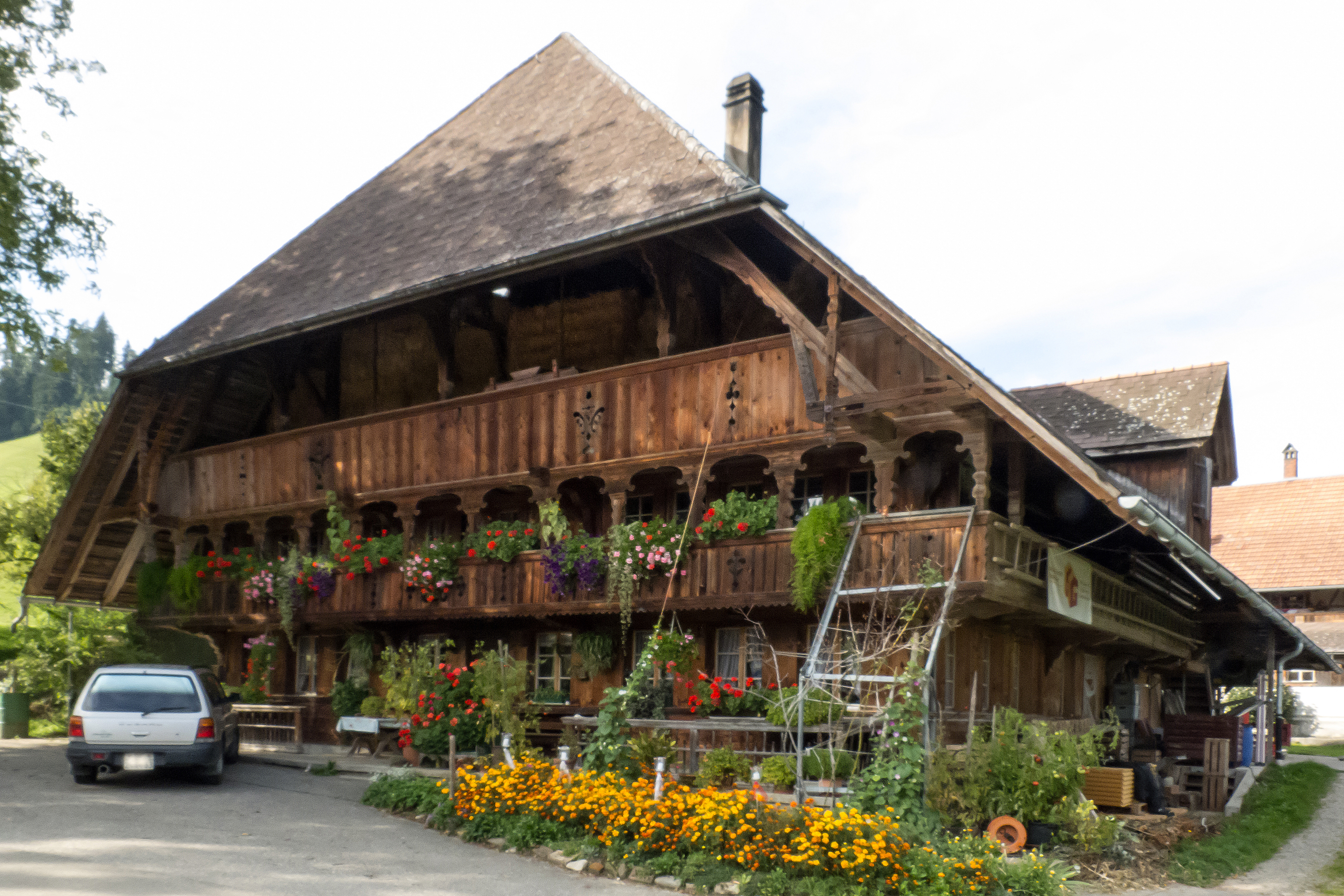 Weiler Wittenbach bei Lauperswil, Bauernhaus 597